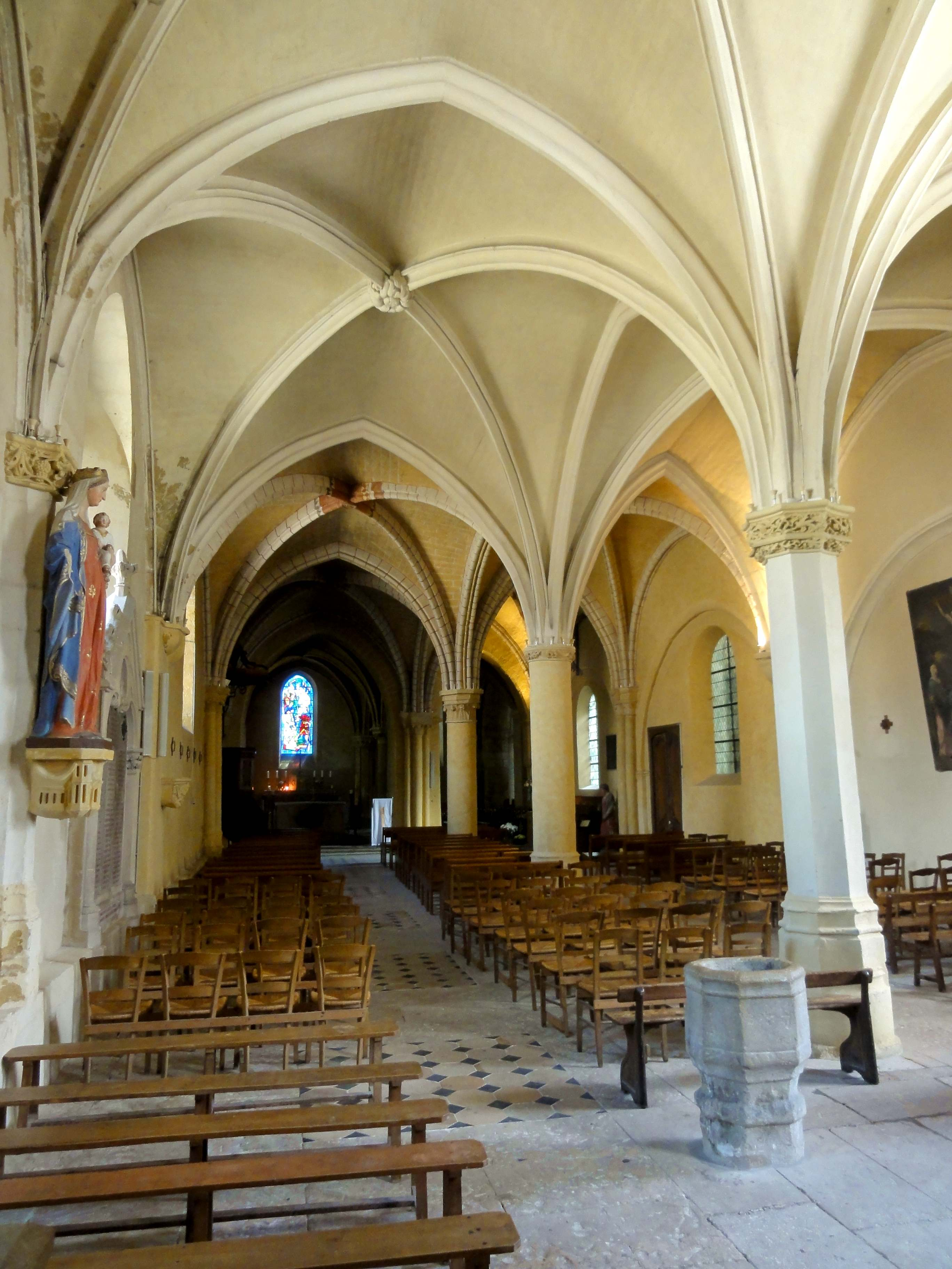 Intérieur de l'église - voir titre.